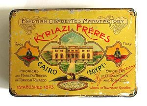 en boks for sigaretter fra Egypt